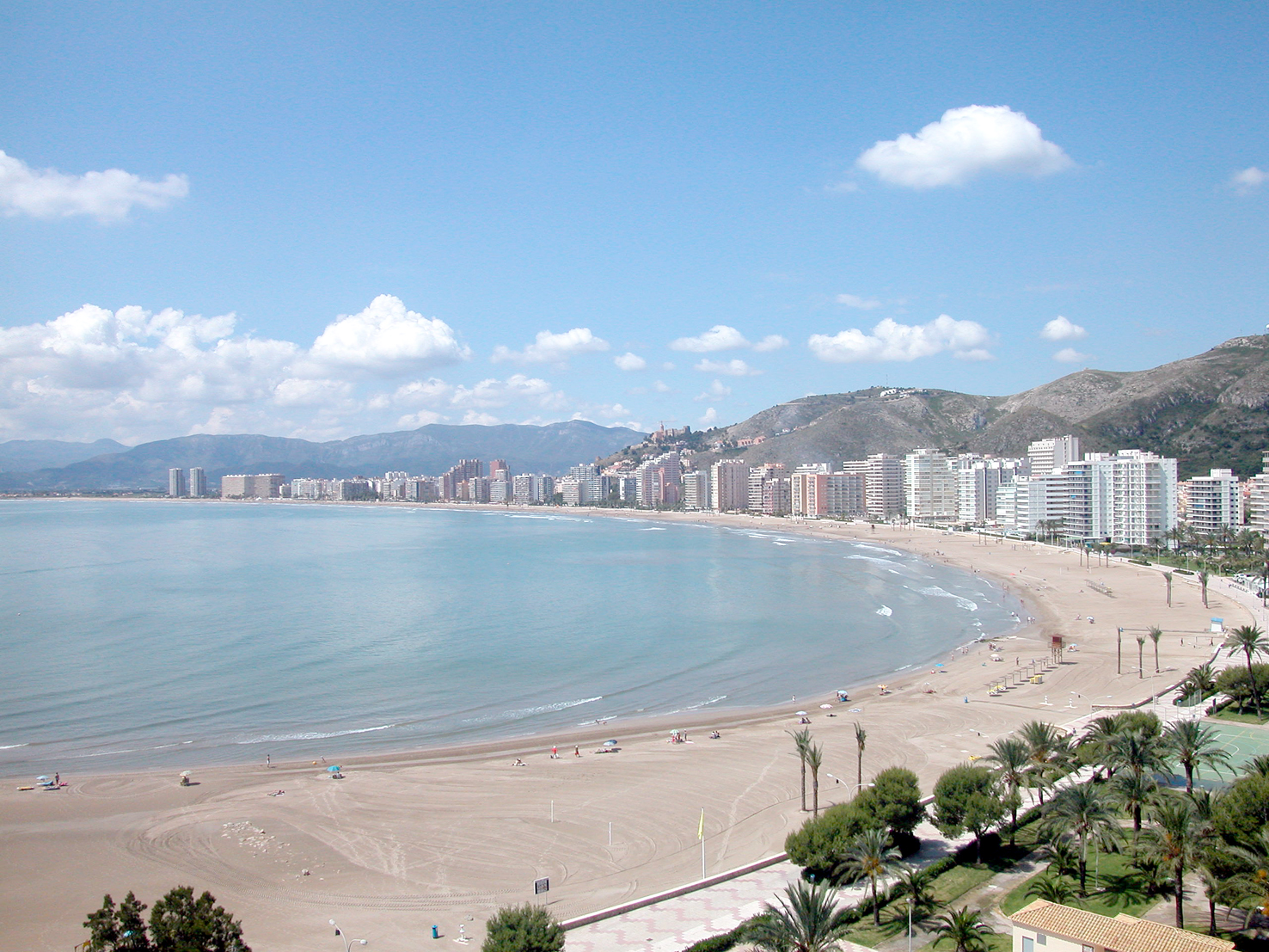 Bahia de Cullera de dia